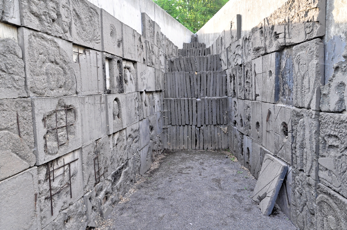 Hannover -KZ-Außenlager Ahlem